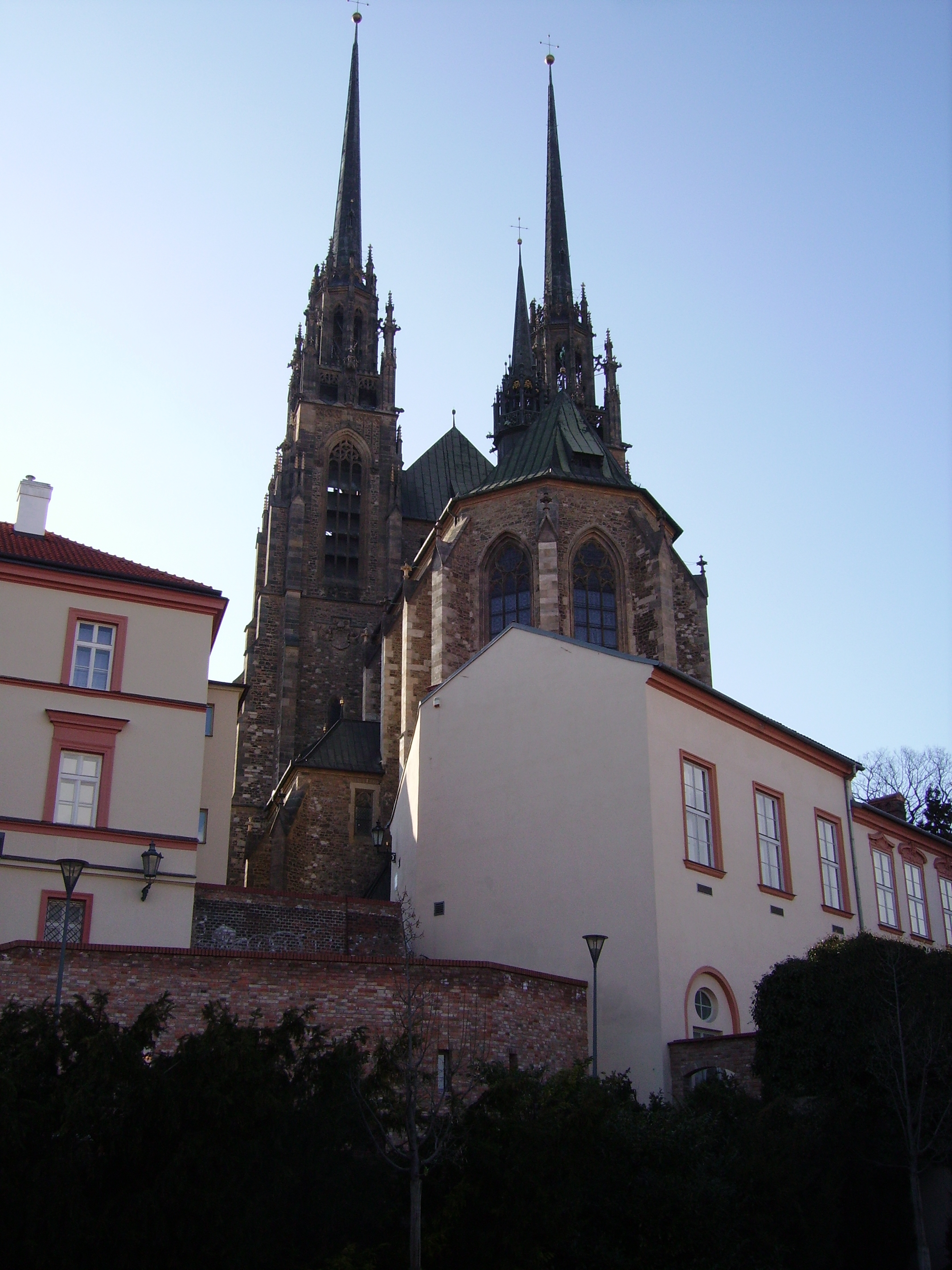 Brno: Petrov, pohled ze zahrad